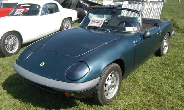 Lotus Elan '66